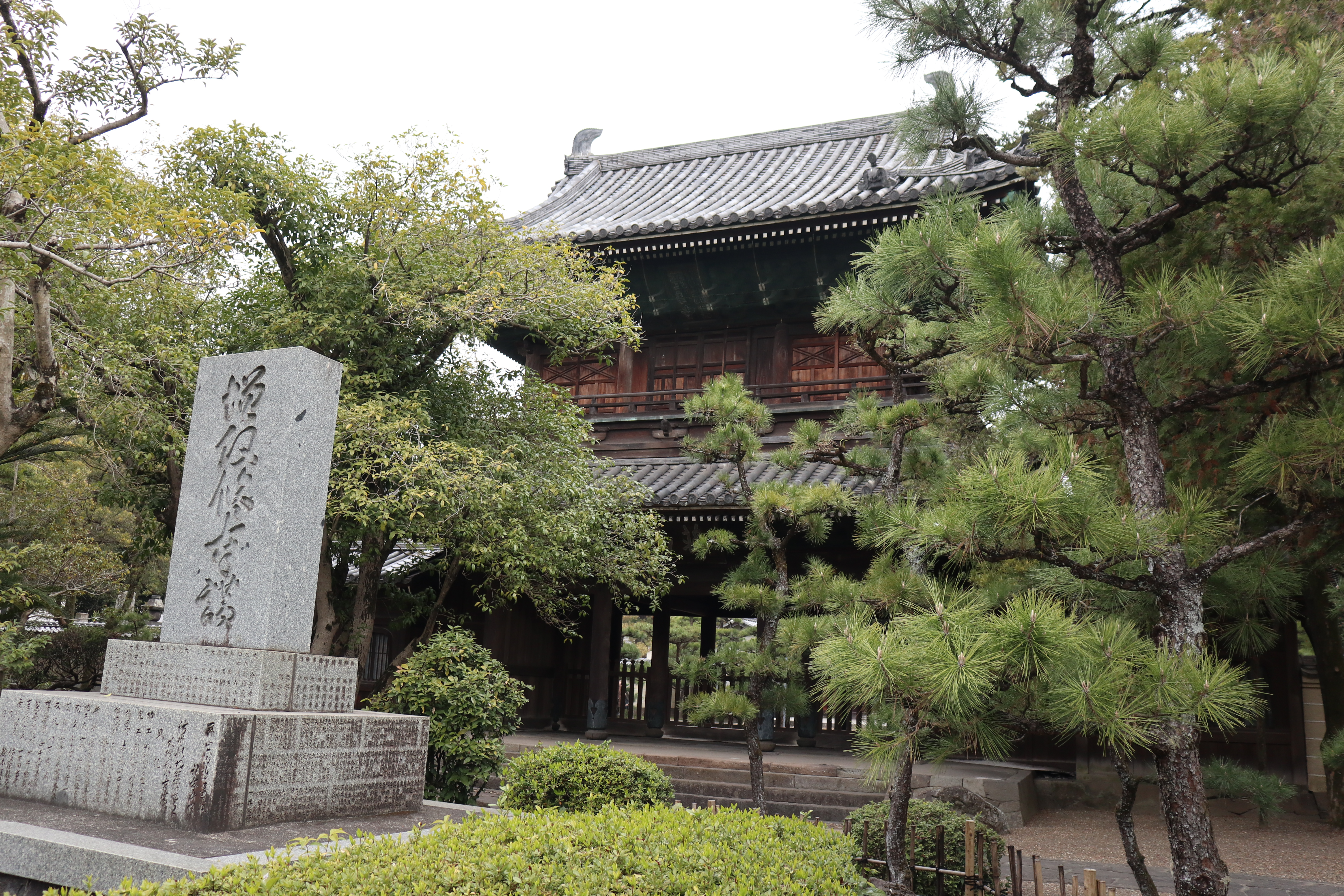 大分市にある臨済宗の寺院万寿寺の山門